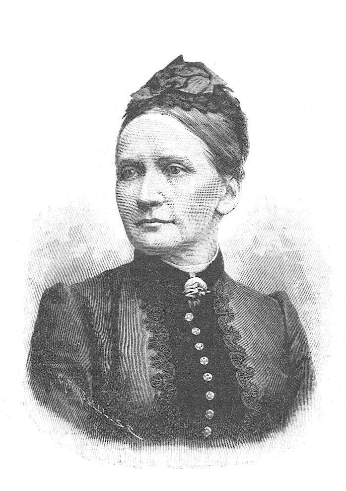 Amy Segerstedt (1835-1928)